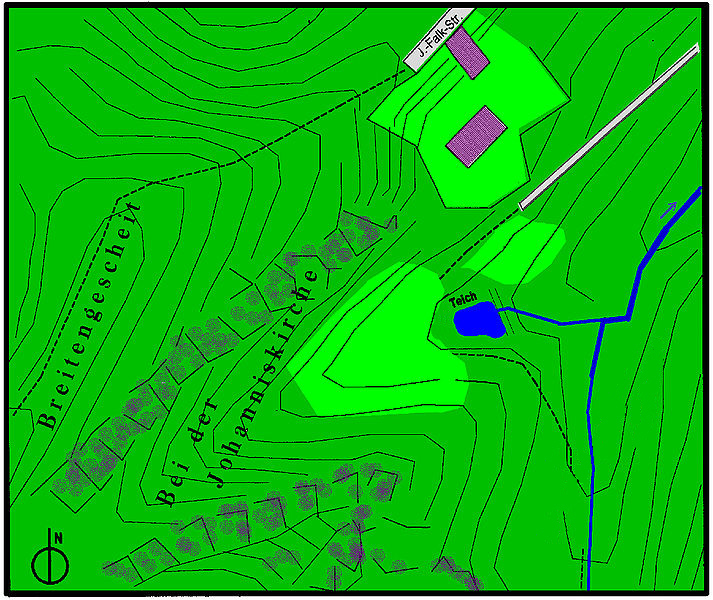 Johanniskloster